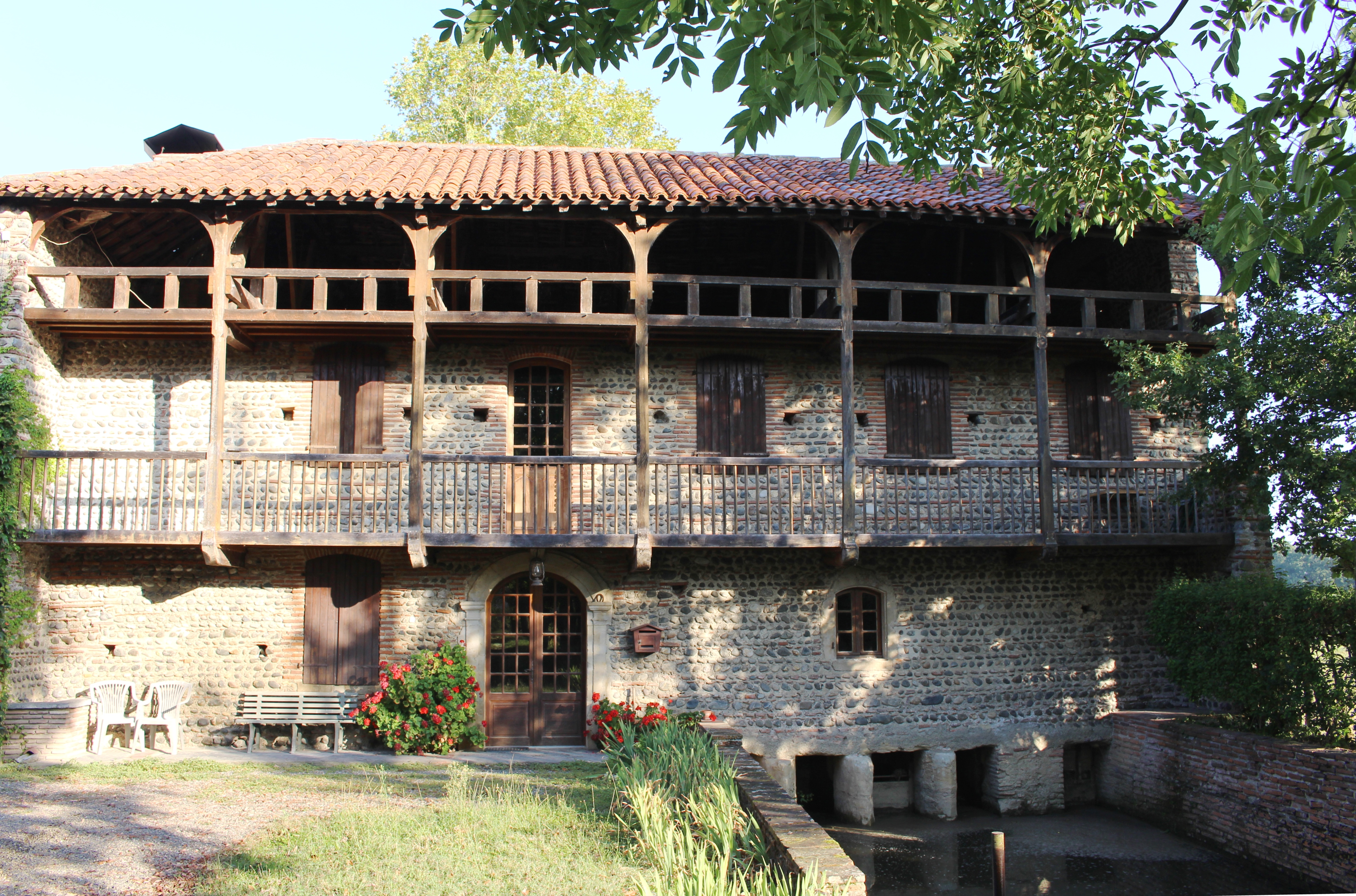 Moulin de Nouilhan (Hautes-Pyrénées)